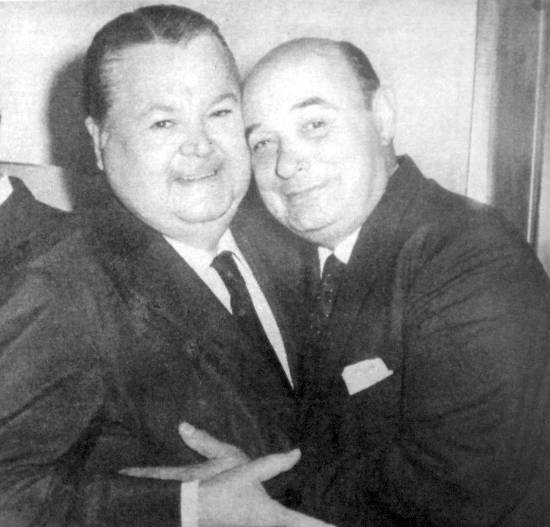 Anibal Troilo y Cátulo Castillo